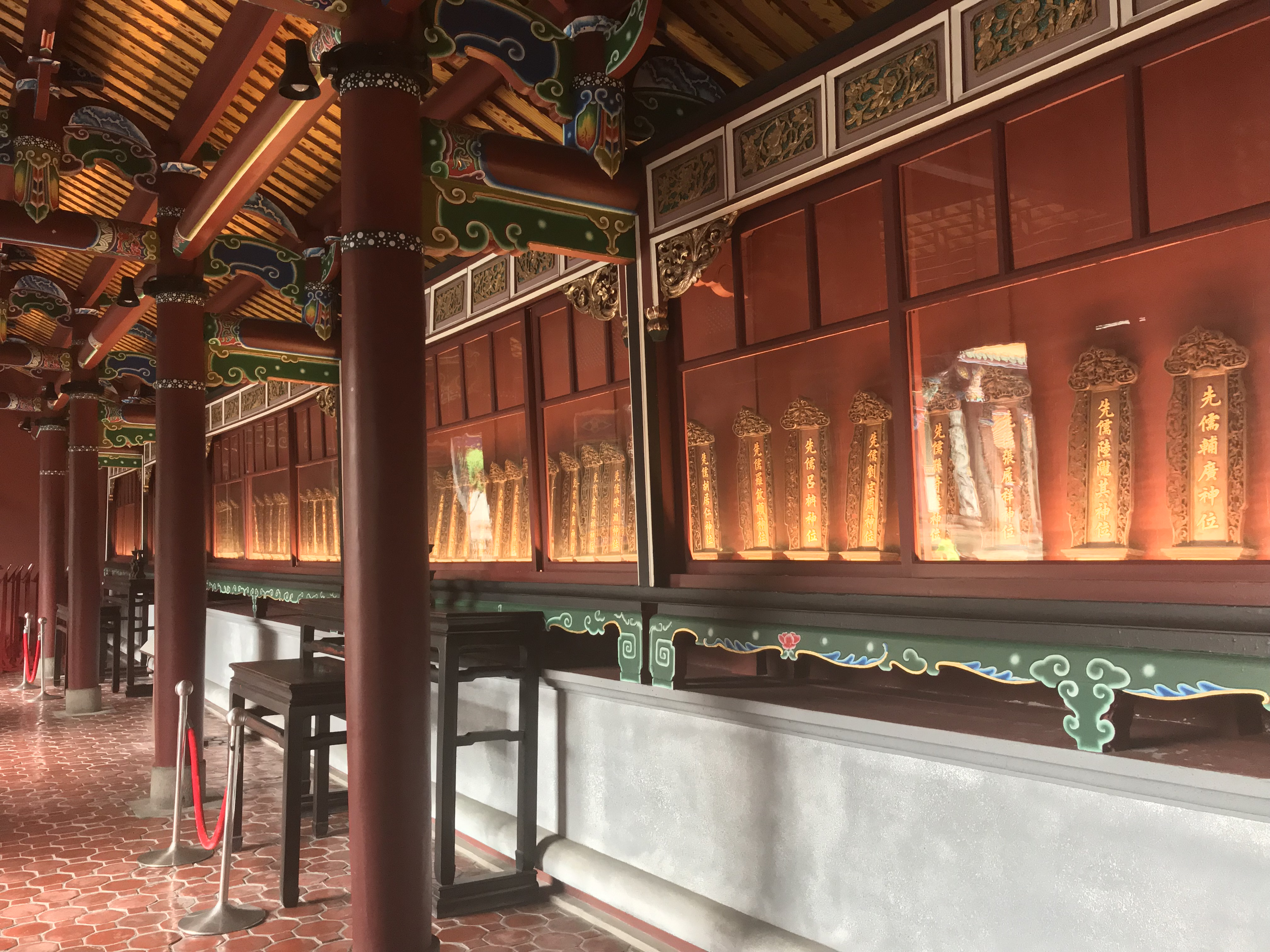 臺北孔子廟東廡內